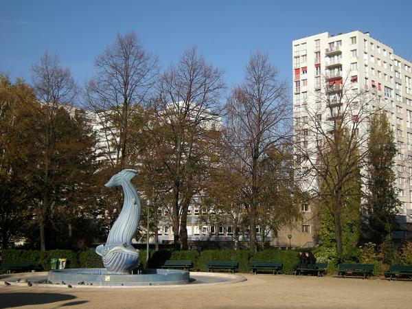 Square Saint-Éloi (Paris XIIème)